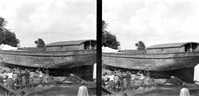 Negatief. Te water laten van een grote prauw te Kangean, Madoera